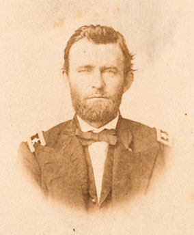 General Ulysses S. Grant. Carte de visite, New Orleans, 1860s.